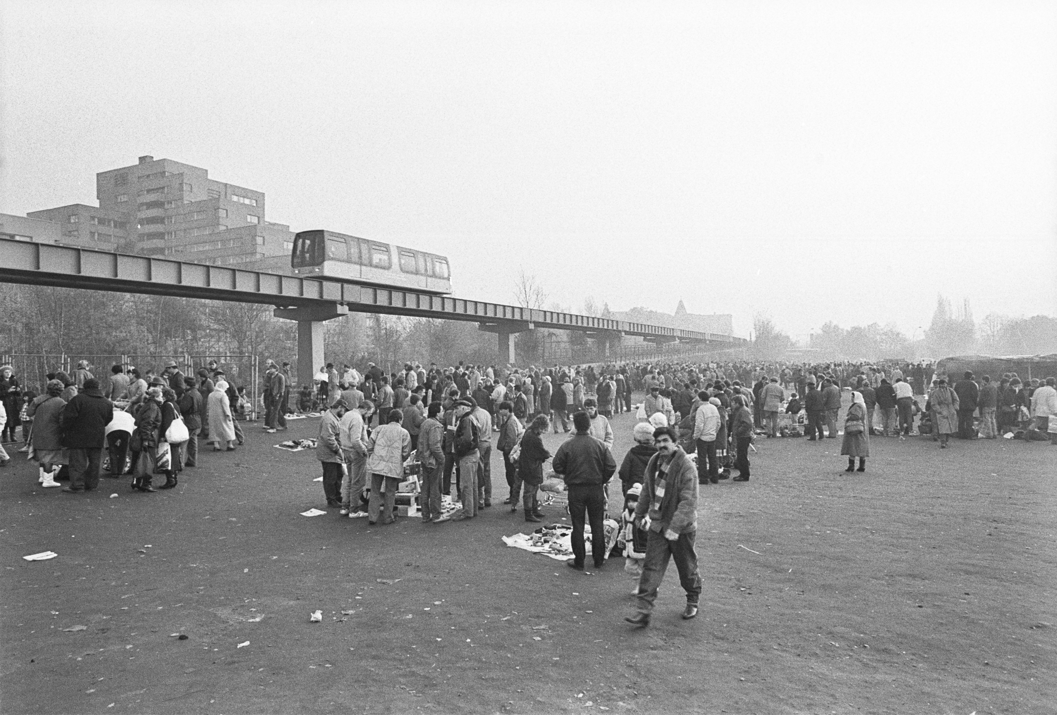 Trödelmarkt am Potsdamer Platz mit M-Bahn , Magnetbahn , Versuchsbetrieb , BVG